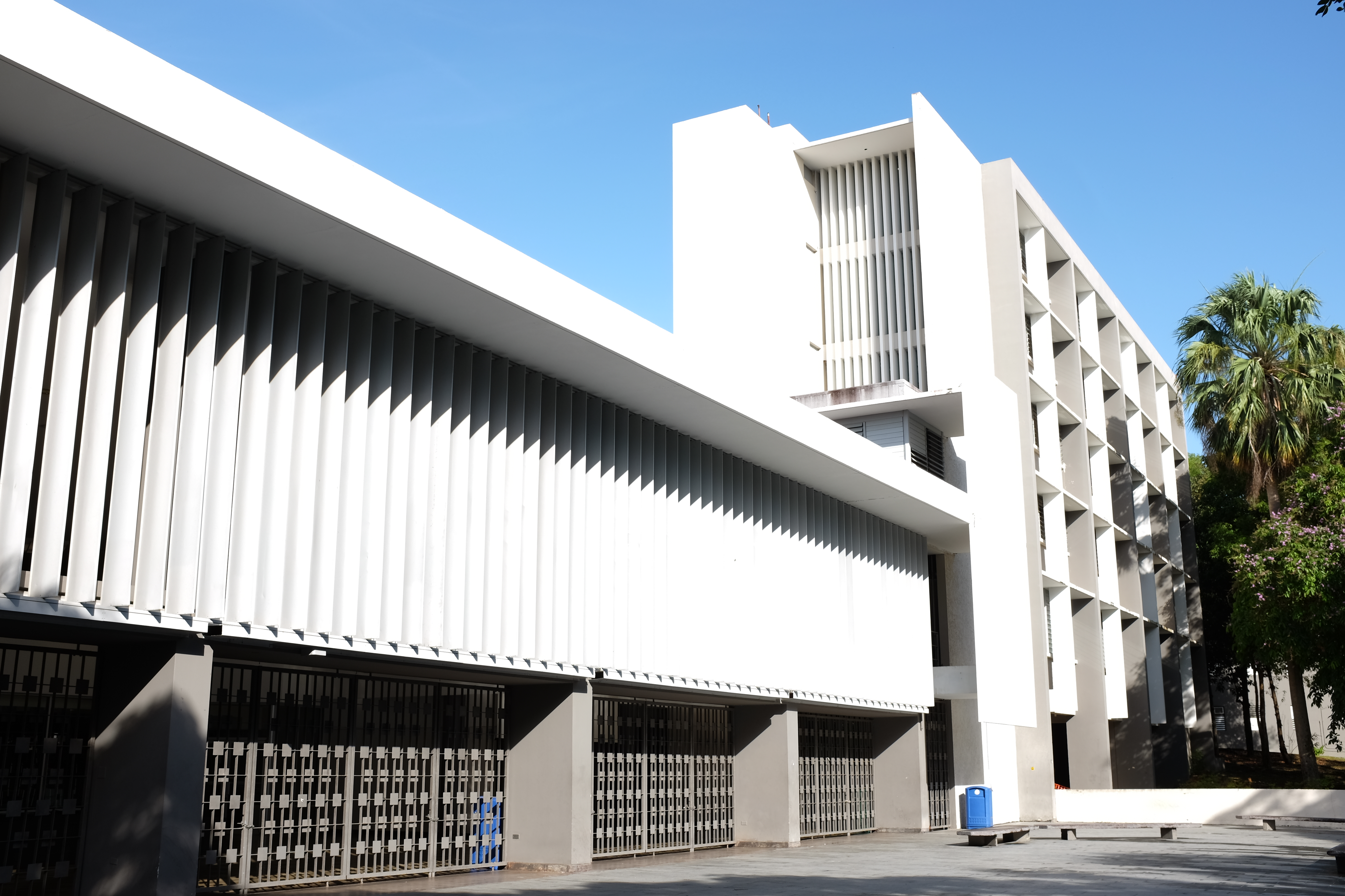 Edificio del Centro de Estudiantes de la Universidad de Puerto Rico Recinto de Río Piedras. Obra del arquitecto Henry Klumb